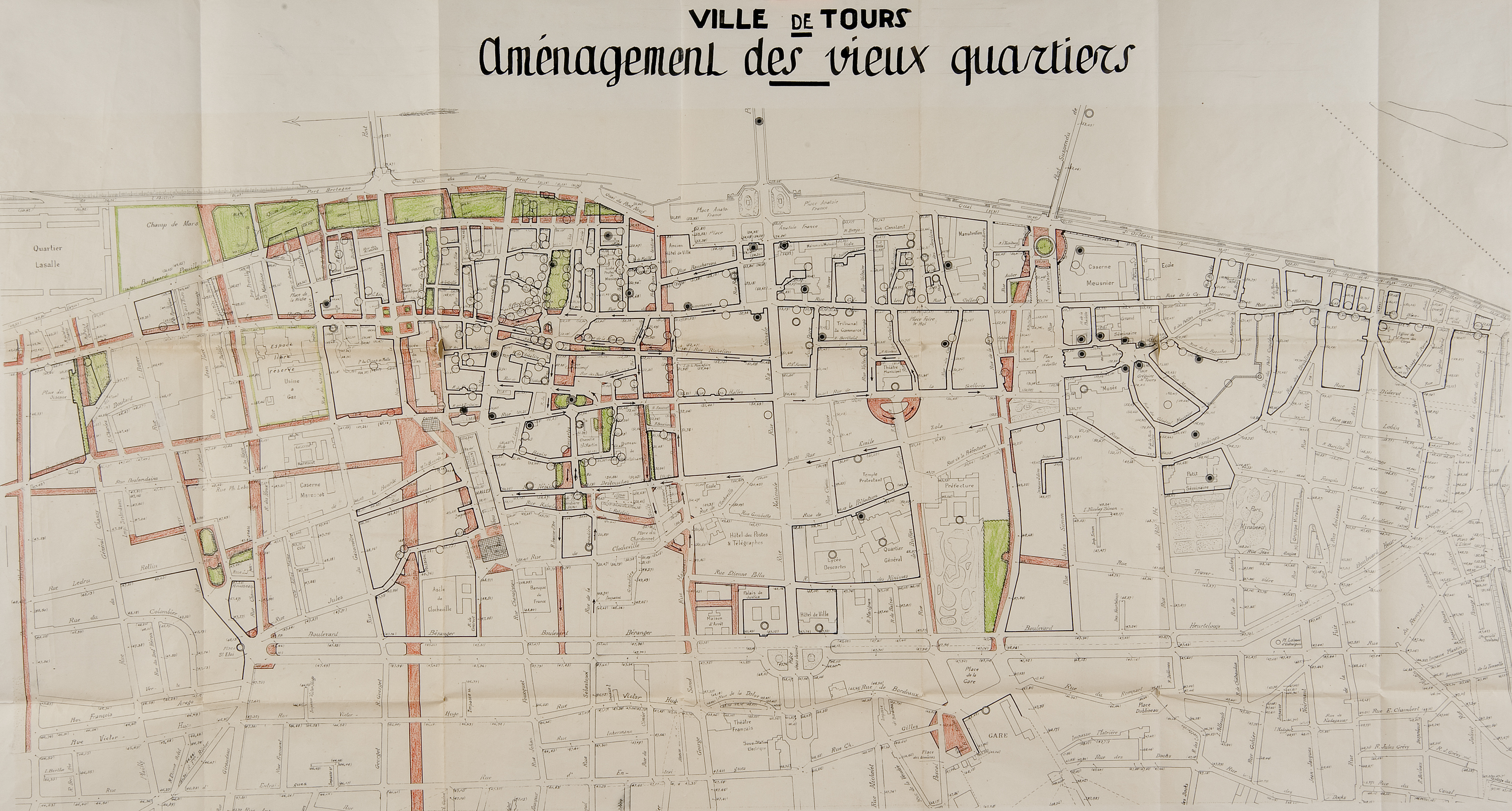 Ville de tours, projet PAEE , 1929, auteur inconnu